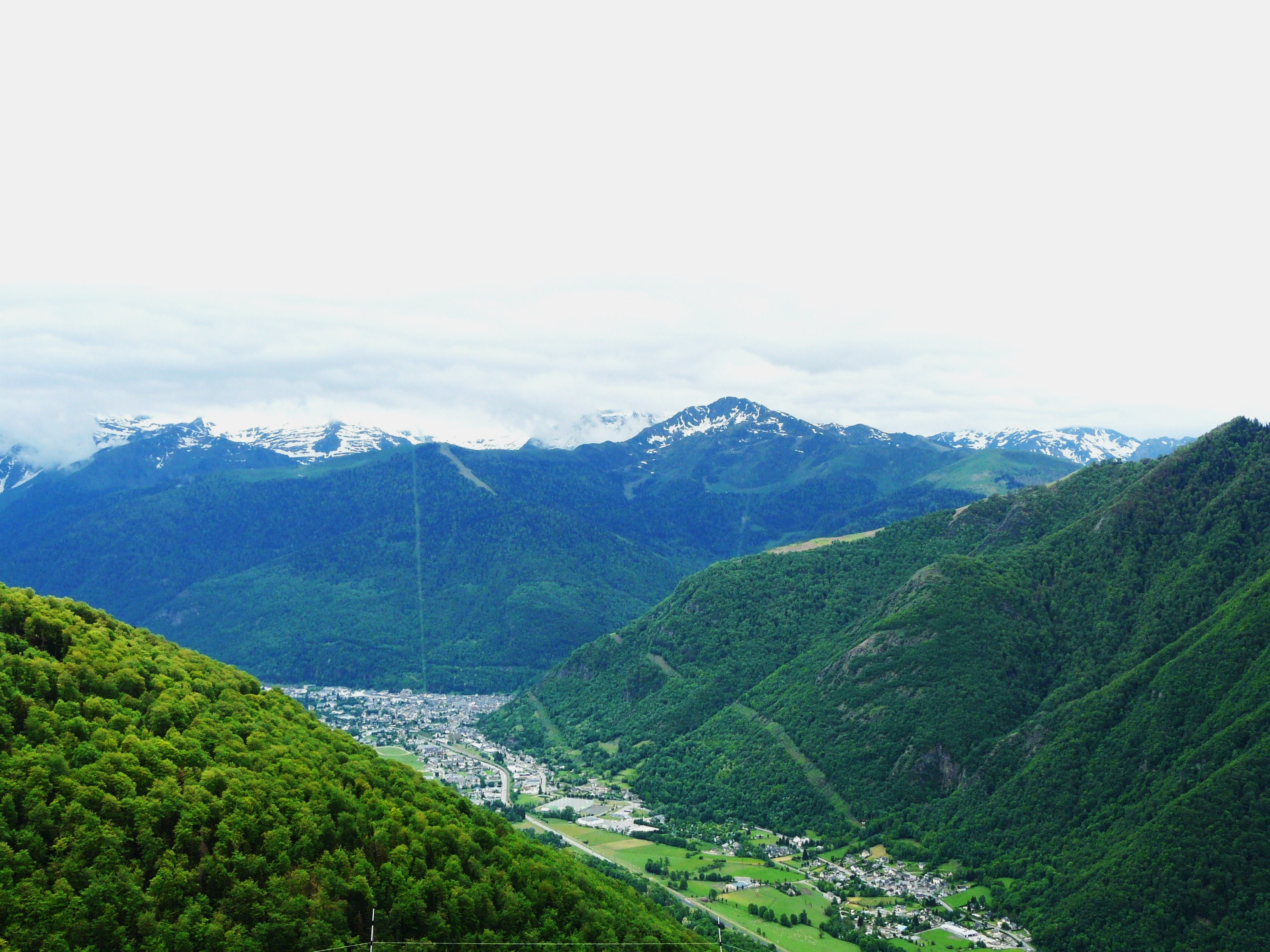 Panorama sur les sommets pyrénéens et la vallée de Luchon (Bagnères-de-Luchon et Moustajon) vus depuis Artigue, Haute-Garonne, France.